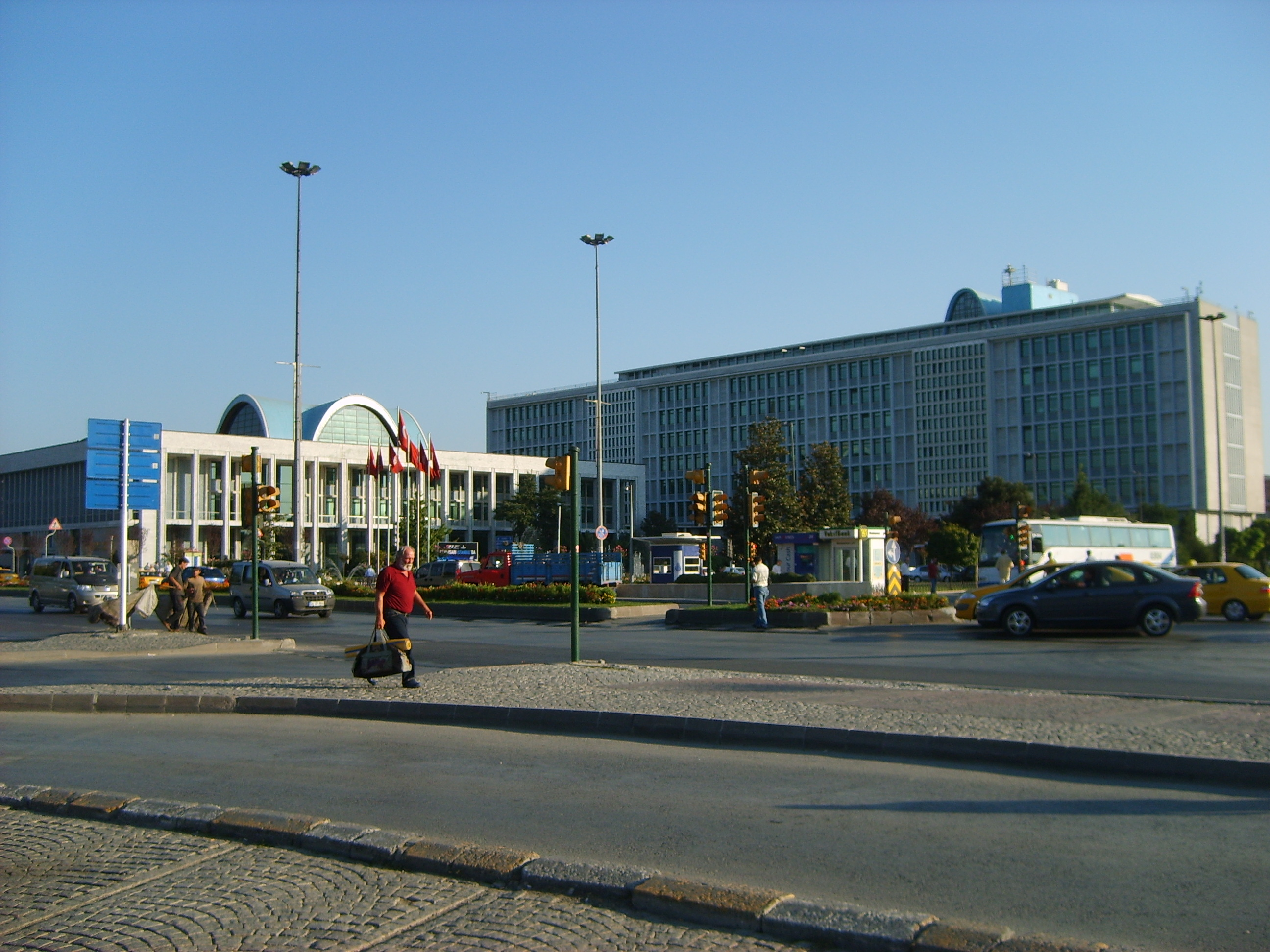 İstanbul Büyükşehir Belediyesi, Istanbul Metropolitan Municipality